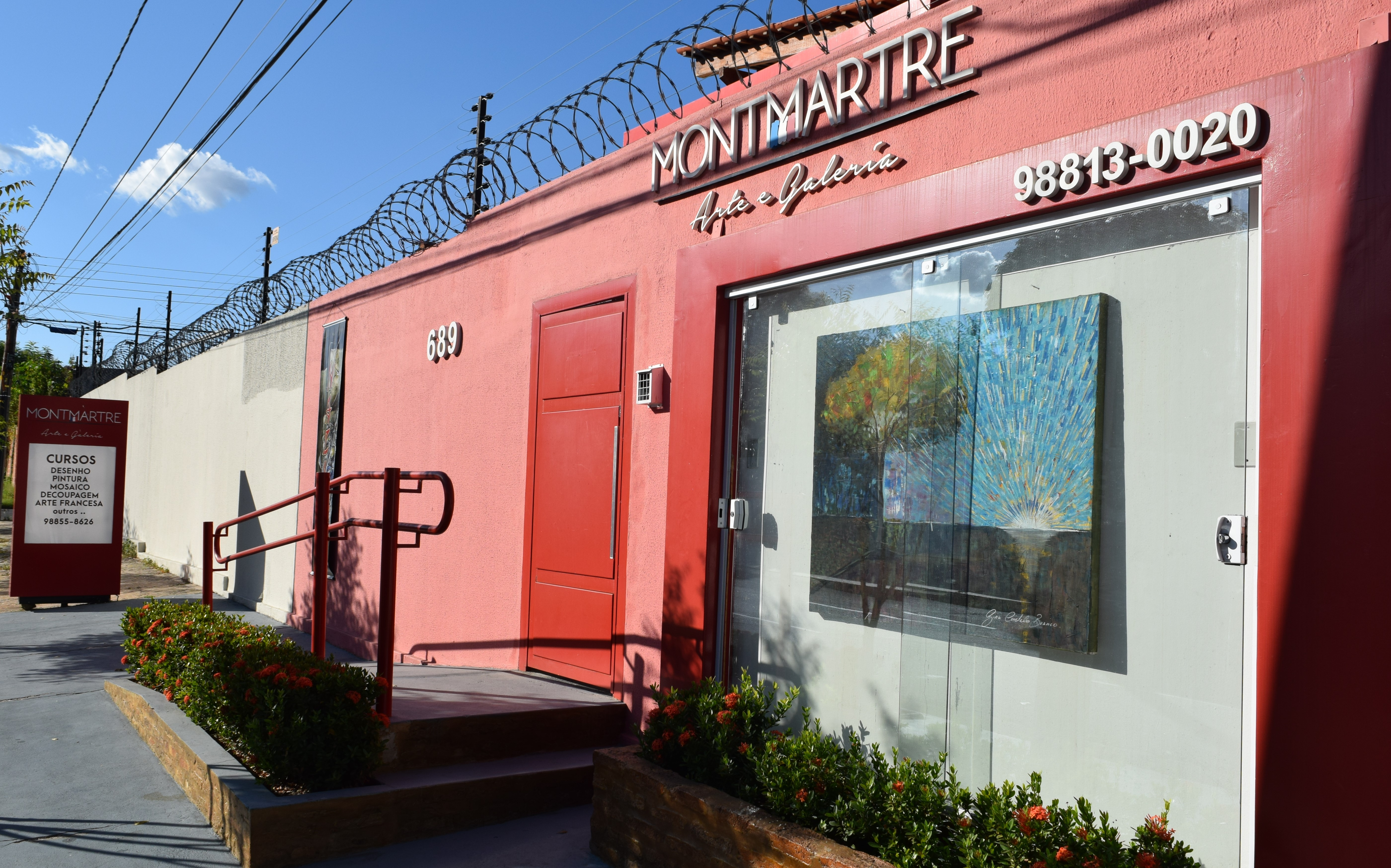 Fachada da Galeria Montmartre